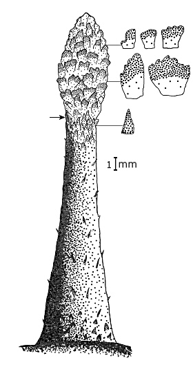 Mental barbel of Hopbeard plunderfish Pogonophryne neyelovi Shandikov et Eakin, 2013, holotype, Ross Sea, Antarctica